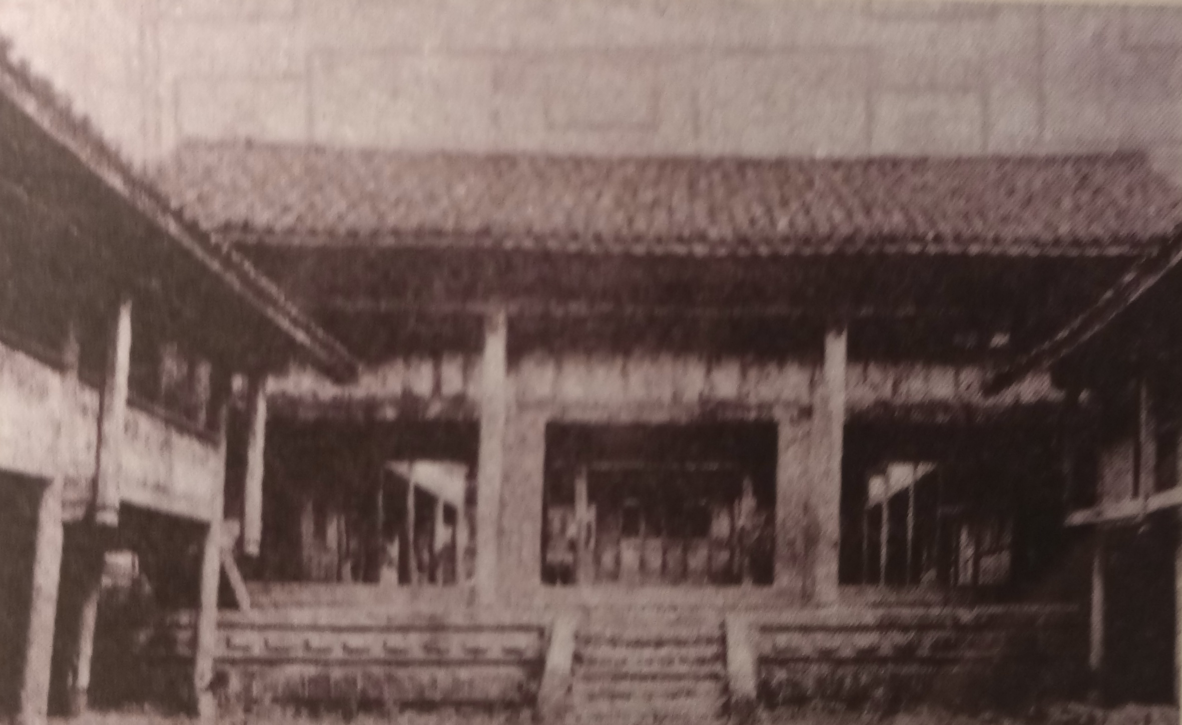 中文（中国大陆）: 勐板土千总衙门